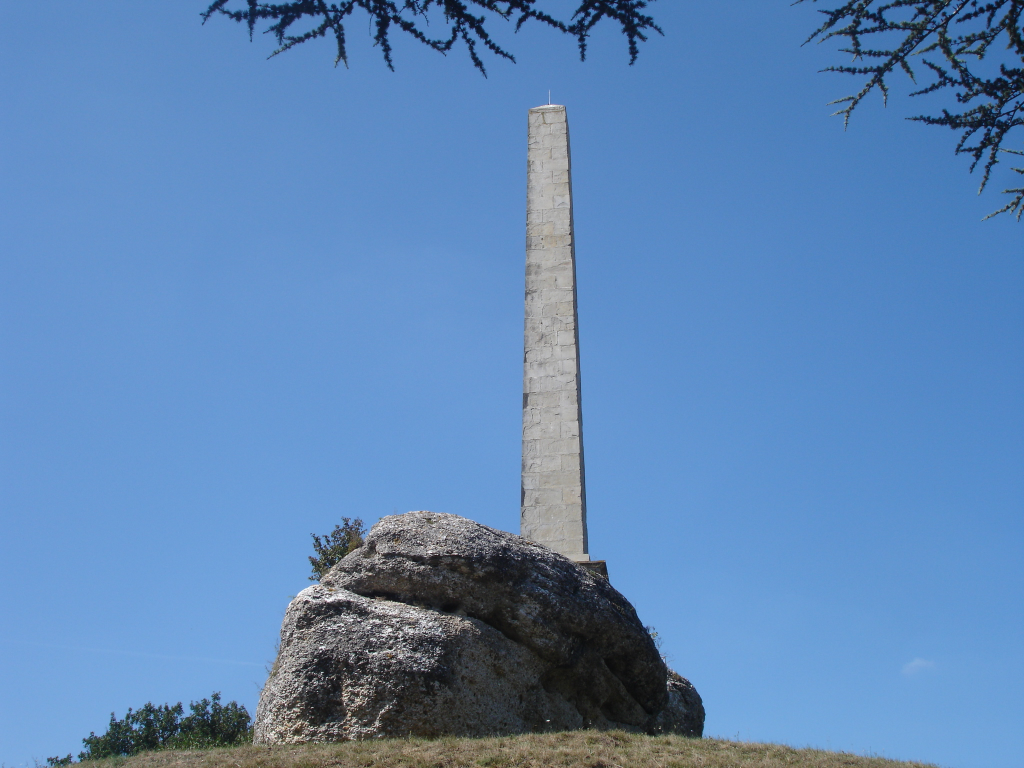 France, Aude (11), Seuil de Naurouze, Obélisque de Riquet